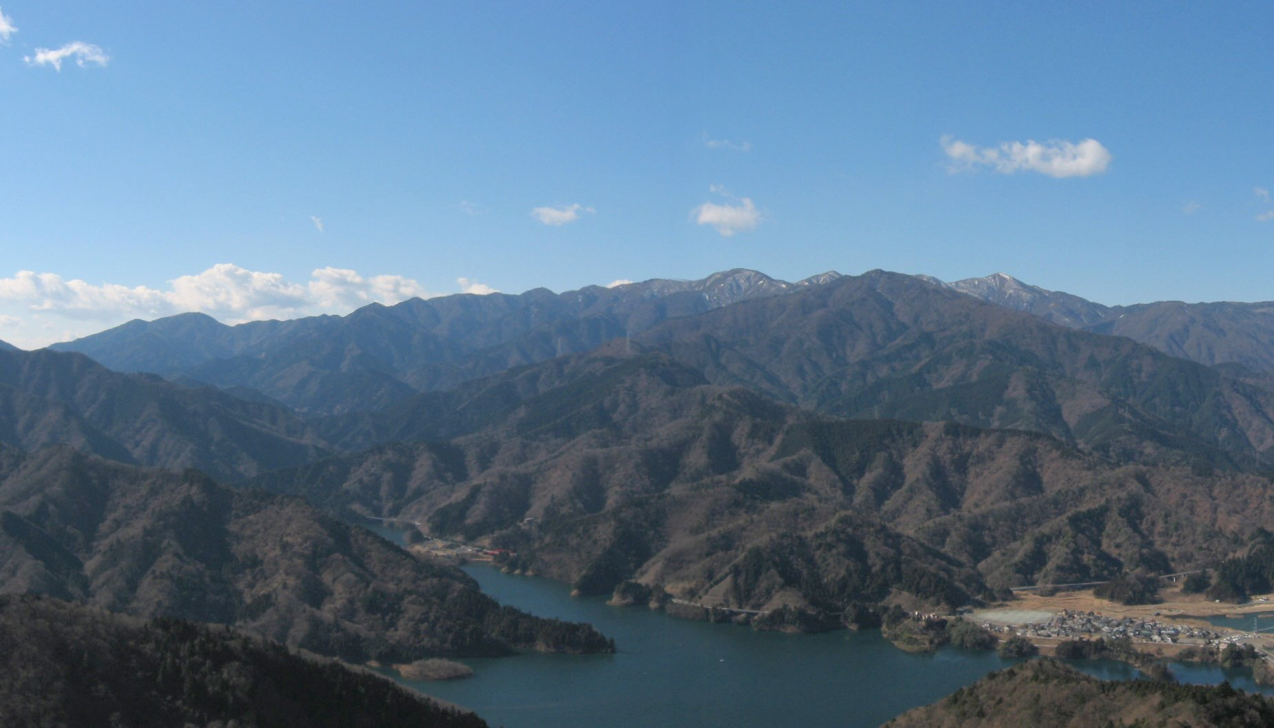 高取山より丹沢山地